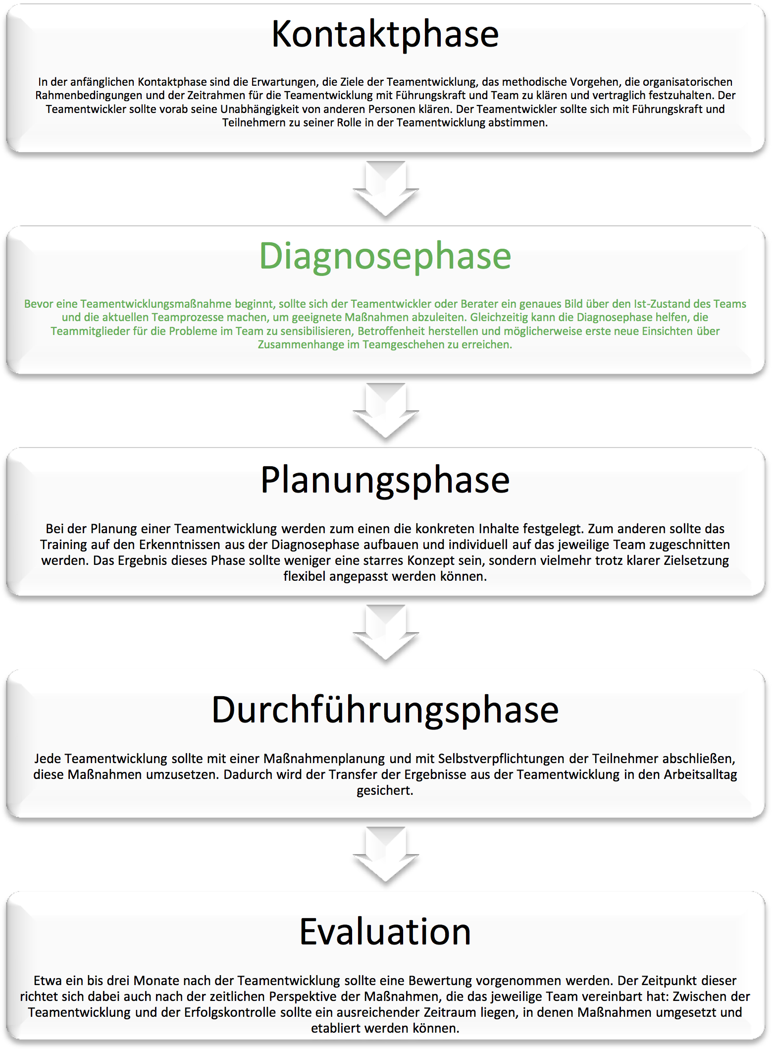 Diese Grafik ordnet die Teamdiagnose in den Teamentwicklungsprozess ein.